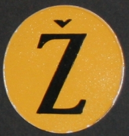 Znak za Židove u NDH, Zagreb, 1942.-1943. g. u Muzeju grada Zagreba snimljen tijekom Noći muzeja